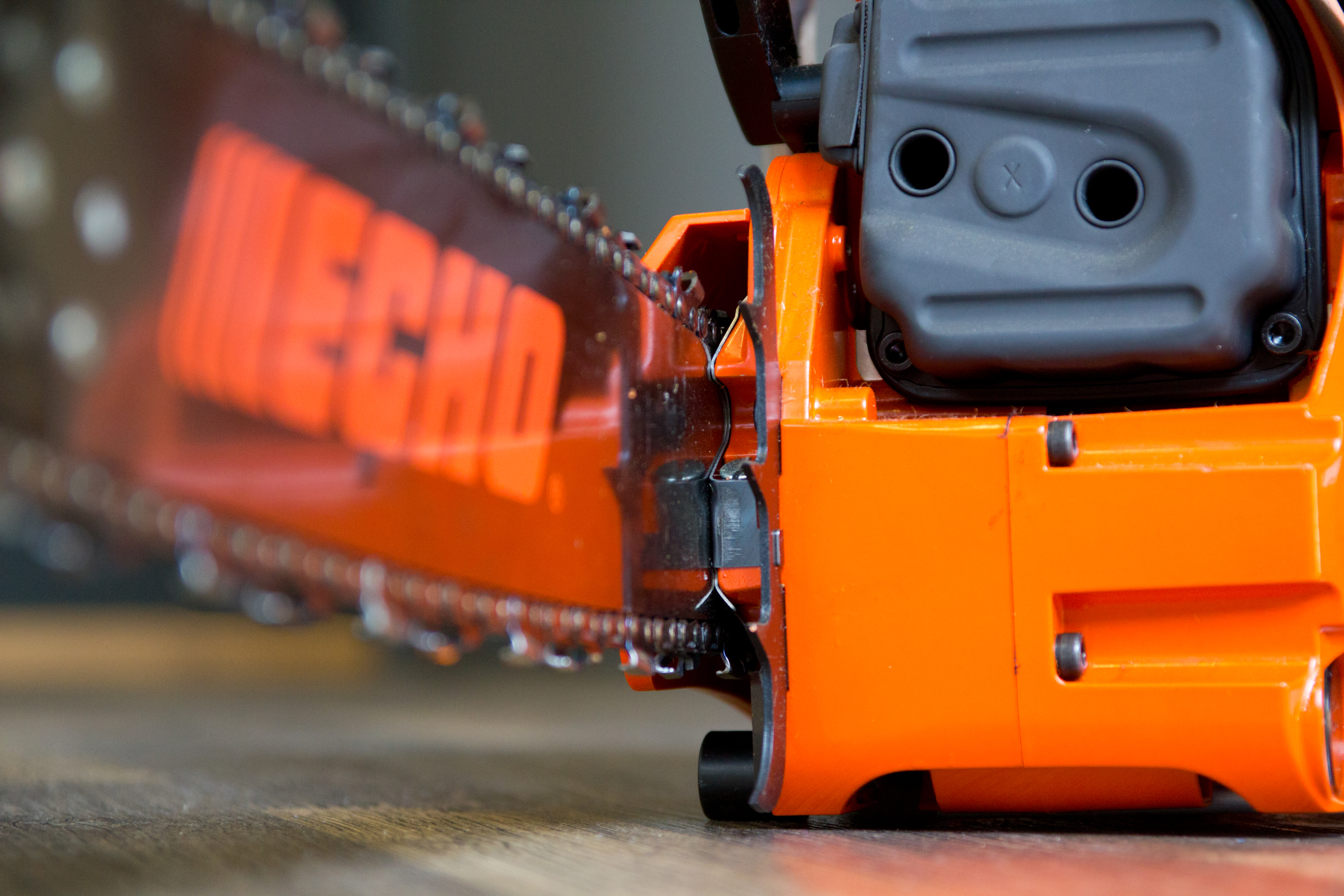 Der Krallenanschlag einer ECHO-Motorsäge.